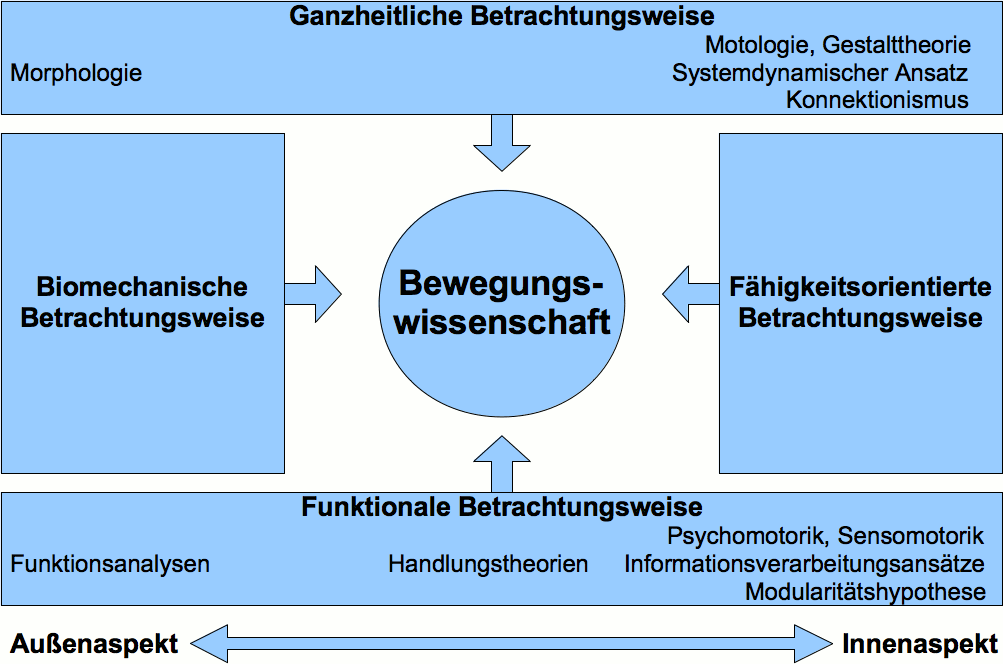 Betrachtungsweisen in der Bewegungswissenschaft (nach Klaus Roth, Klaus Willimczik: Bewegungswissenschaft. Rowohlt Verlag, Reinbek 1999, S. 13.